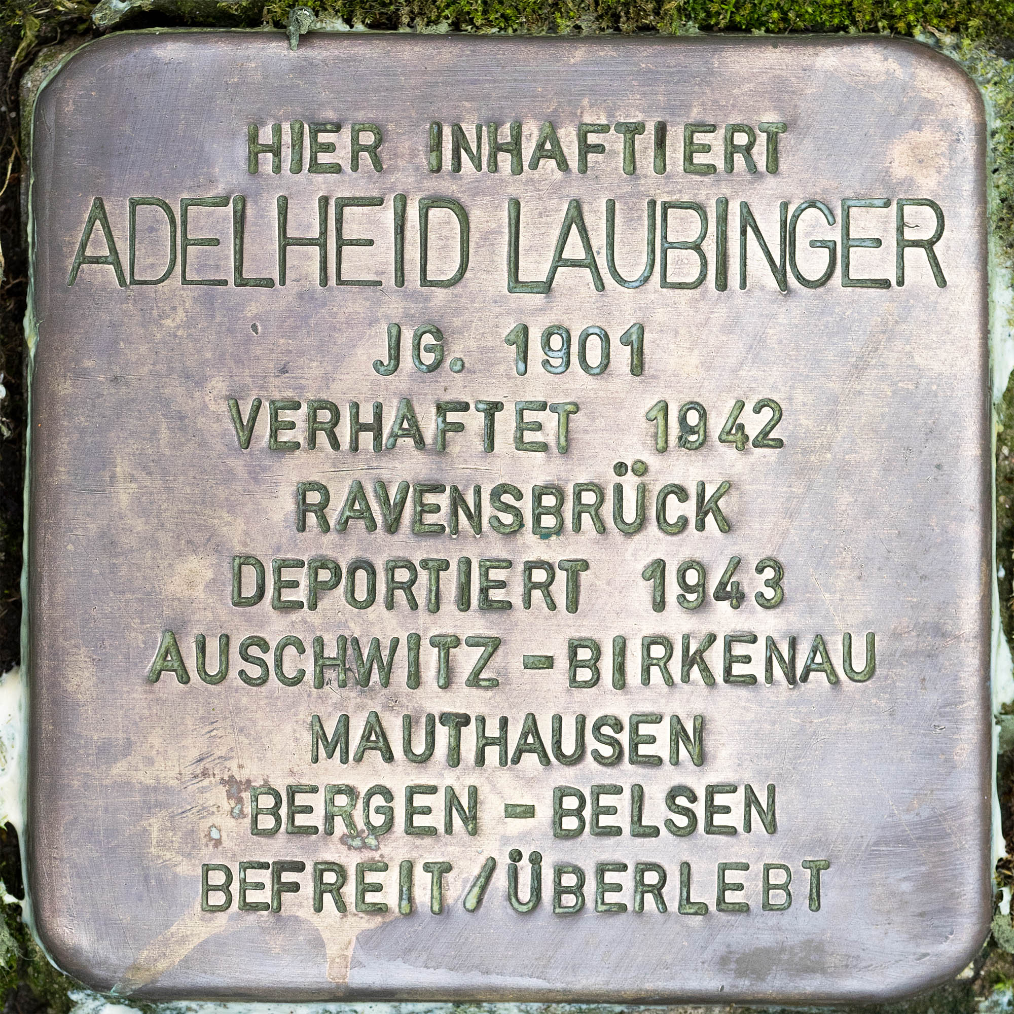 Stolperstein für Laubinger, Adelheid